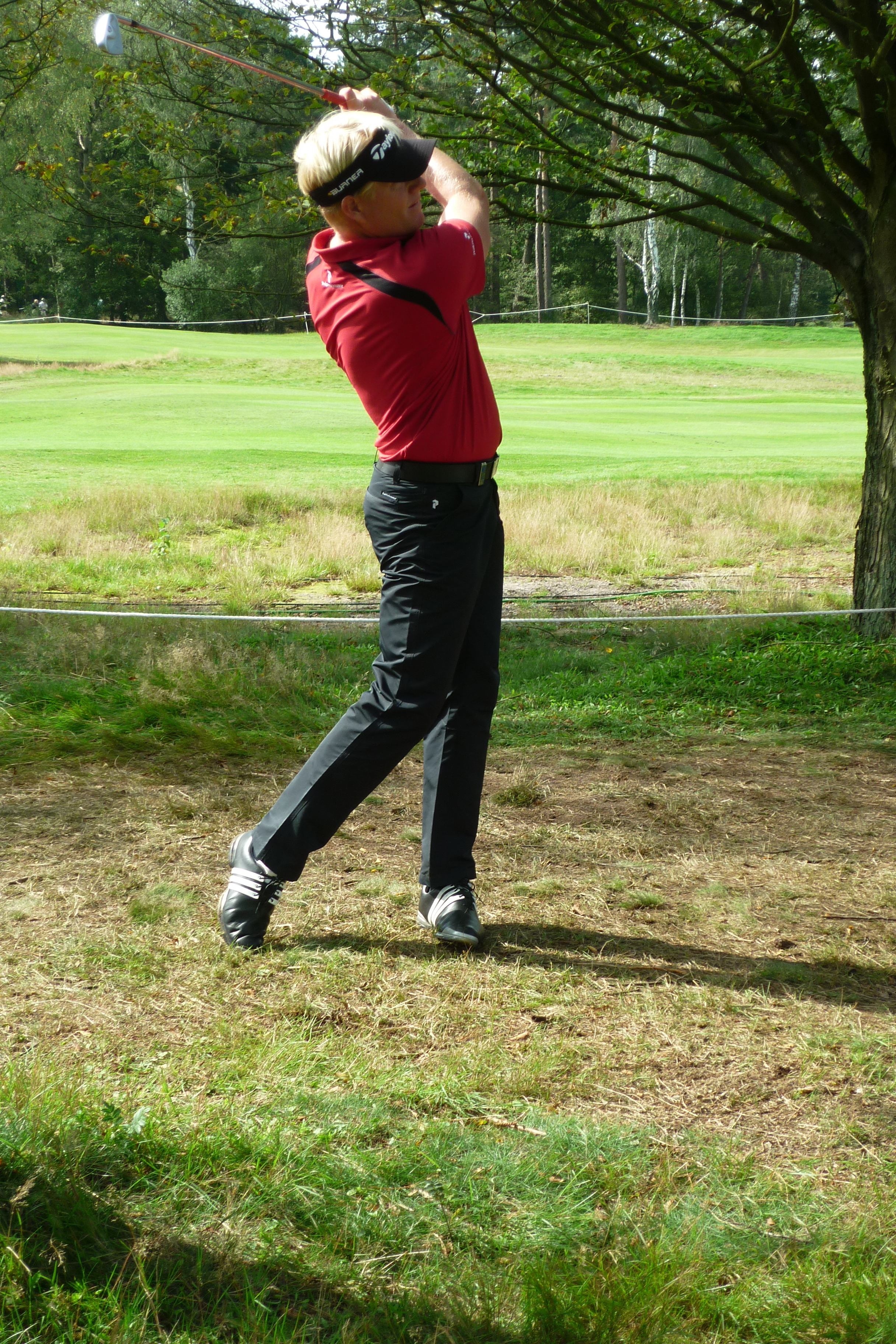 Peter Hedblom KLM_Open_2010